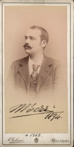 Italian Entomologist Mario Bezzi (1868-1927)